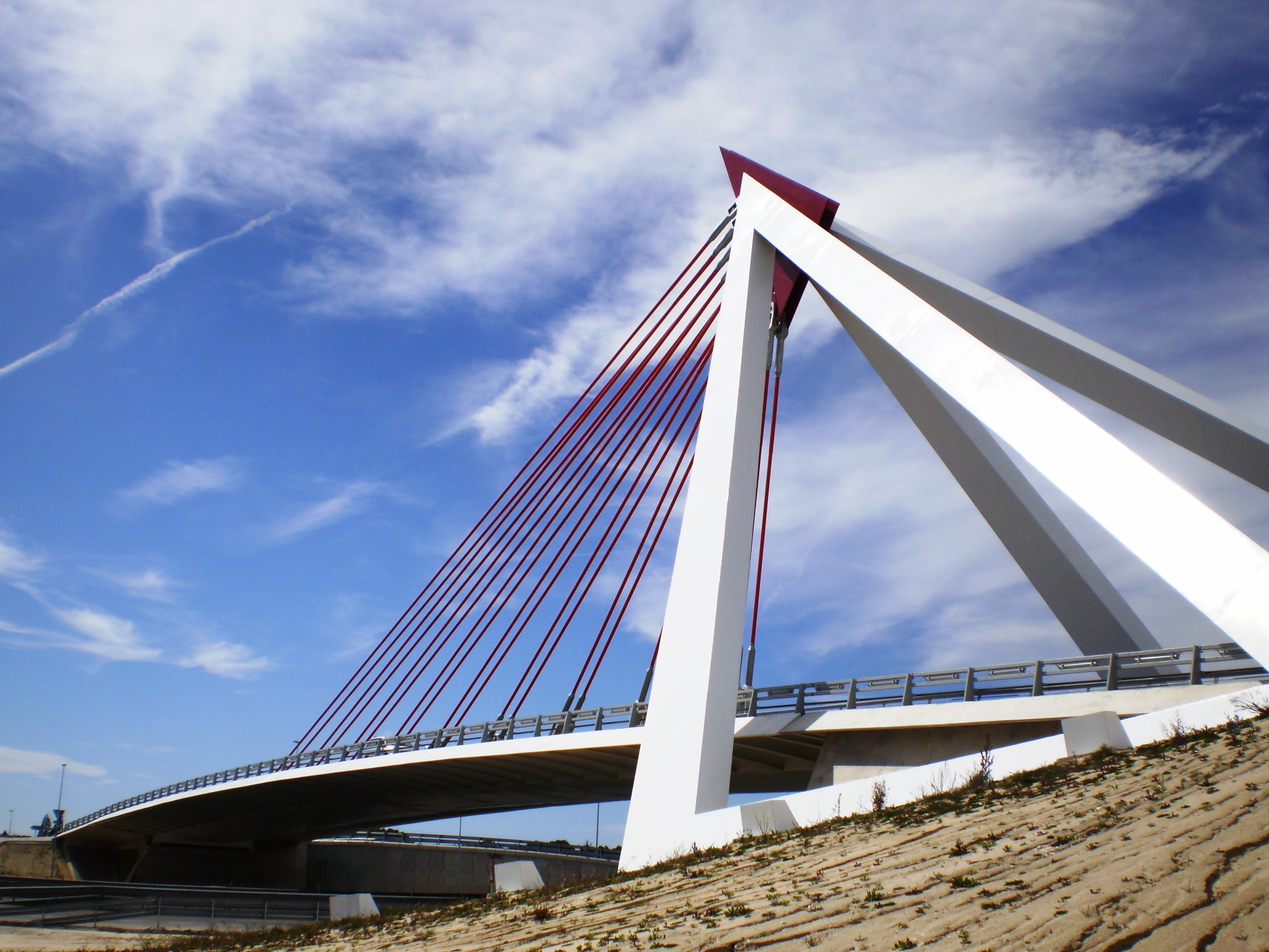 Puerta de Las Rozas Bridge, Las Rozas de Madrid, Community of Madrid, Spain